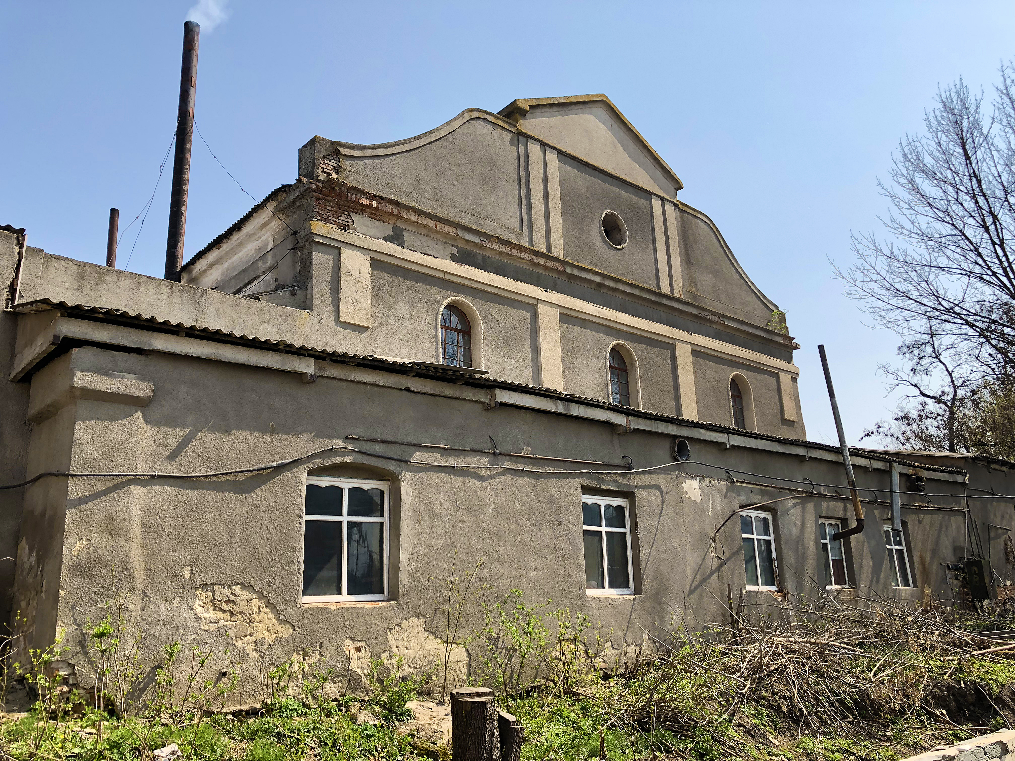 Головна синагога, Іллінці, вул. Пестеля, 7